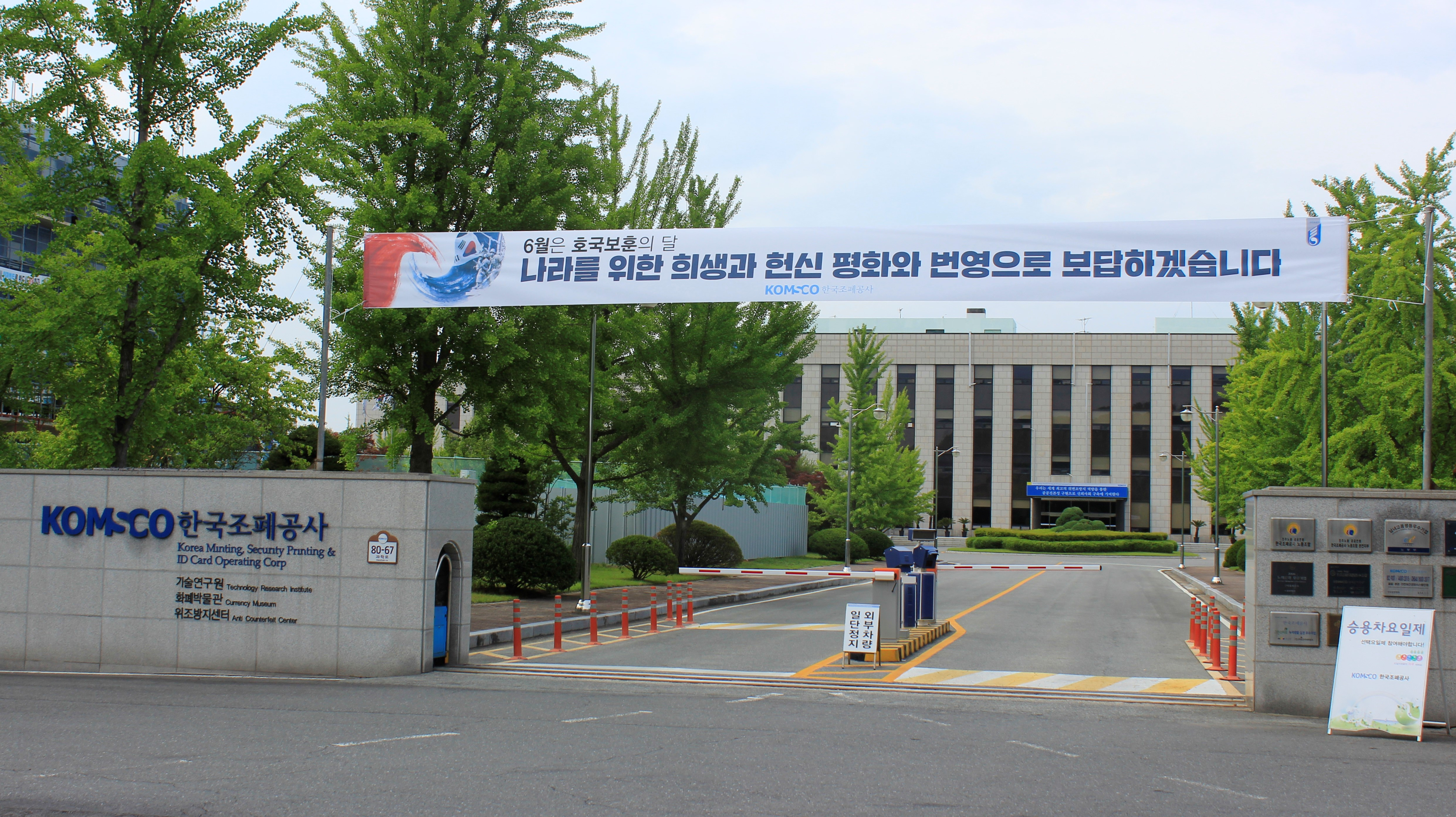 한국조폐공사 정문